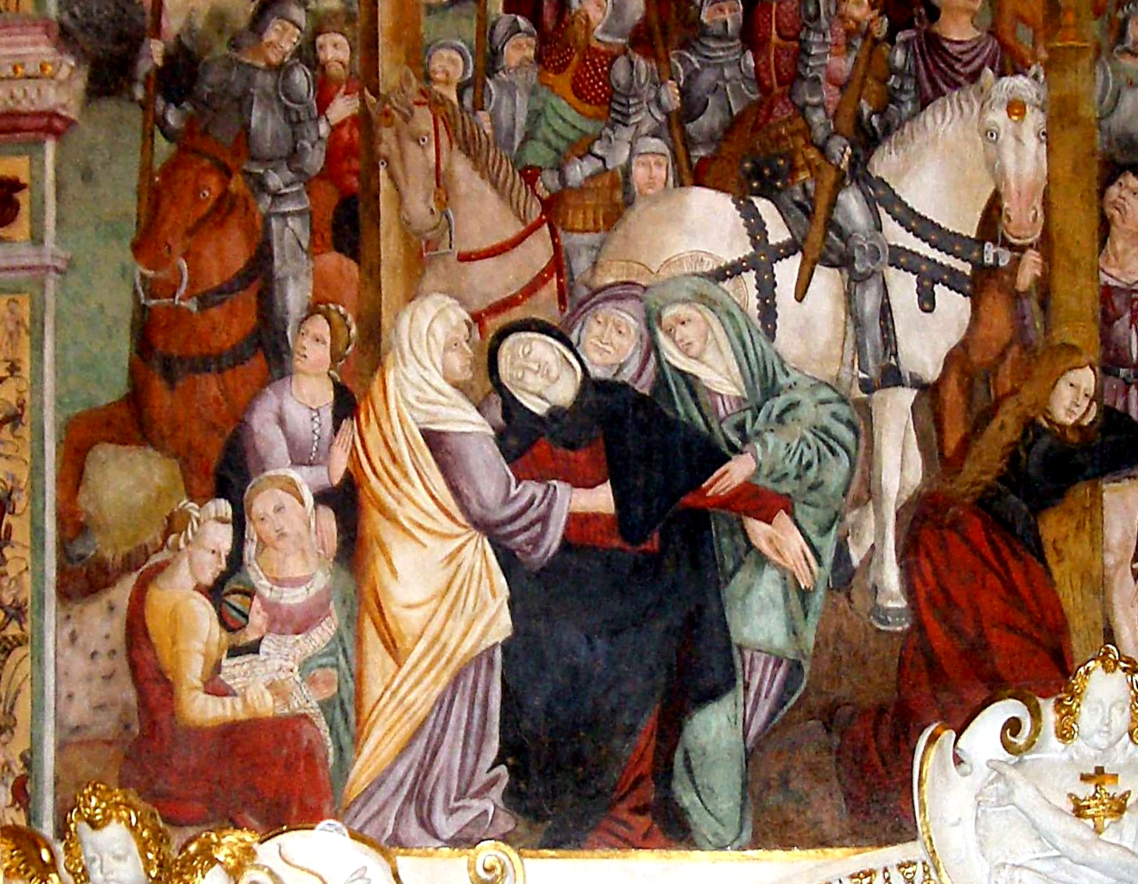 Bellinzona, Church of Santa Maria delle Grazie, Crucifixion (detail), School of Stefano Scotto, fresco, 1513-15 ca.